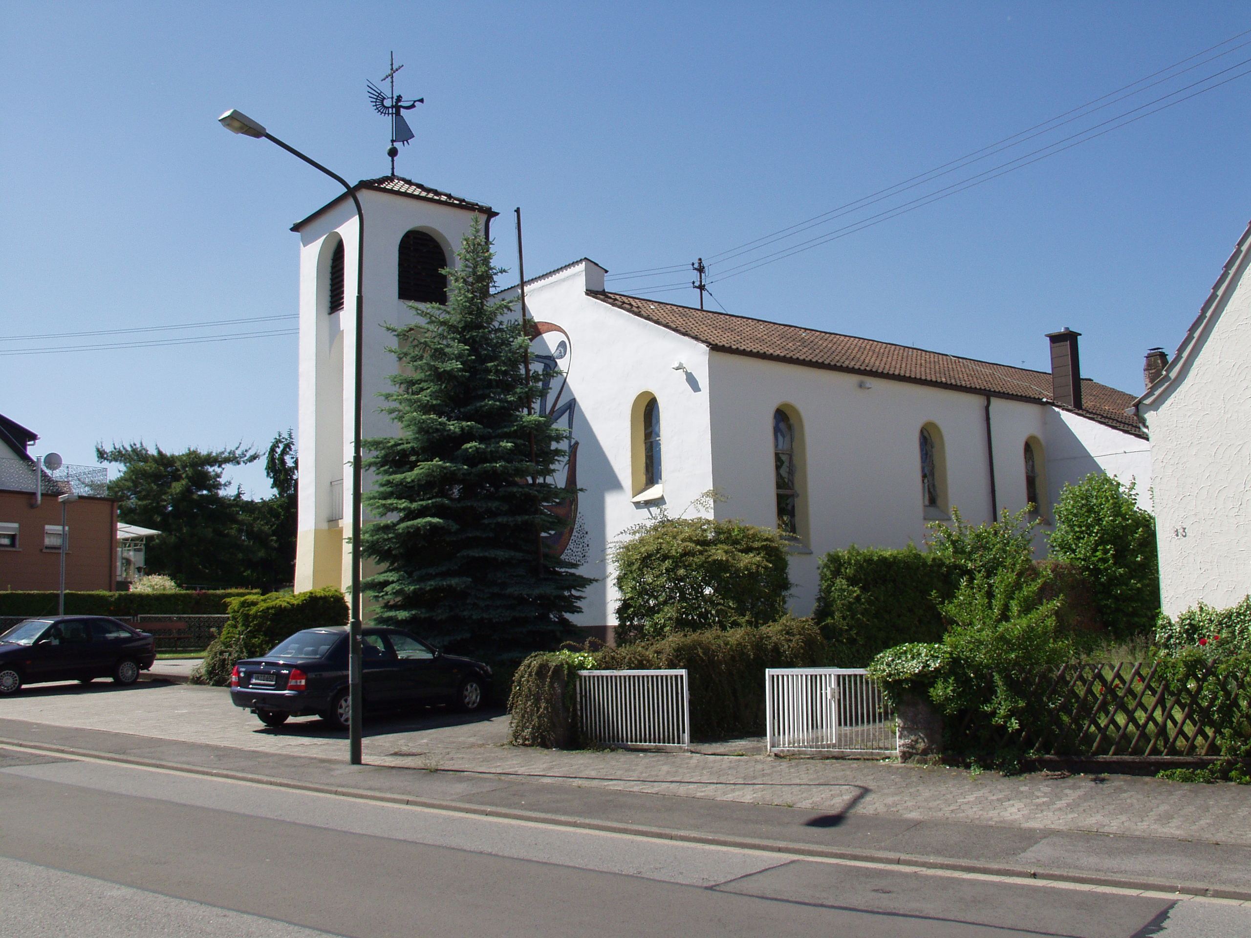 Katholische Kirche St. Georg, Kohlhof